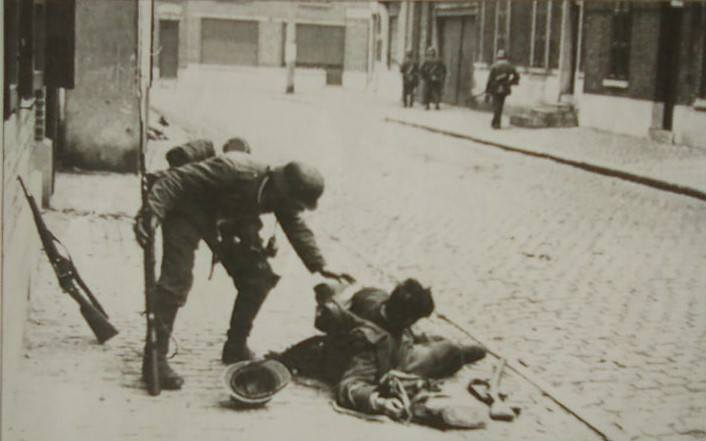 Soldat allemand de l'Infanterie Regiment 469 (ID. 269) aidant un blessé français du 158e régiment d'infanterie (43e DI) à Thulin, en Belgique, le 23 mai 1940